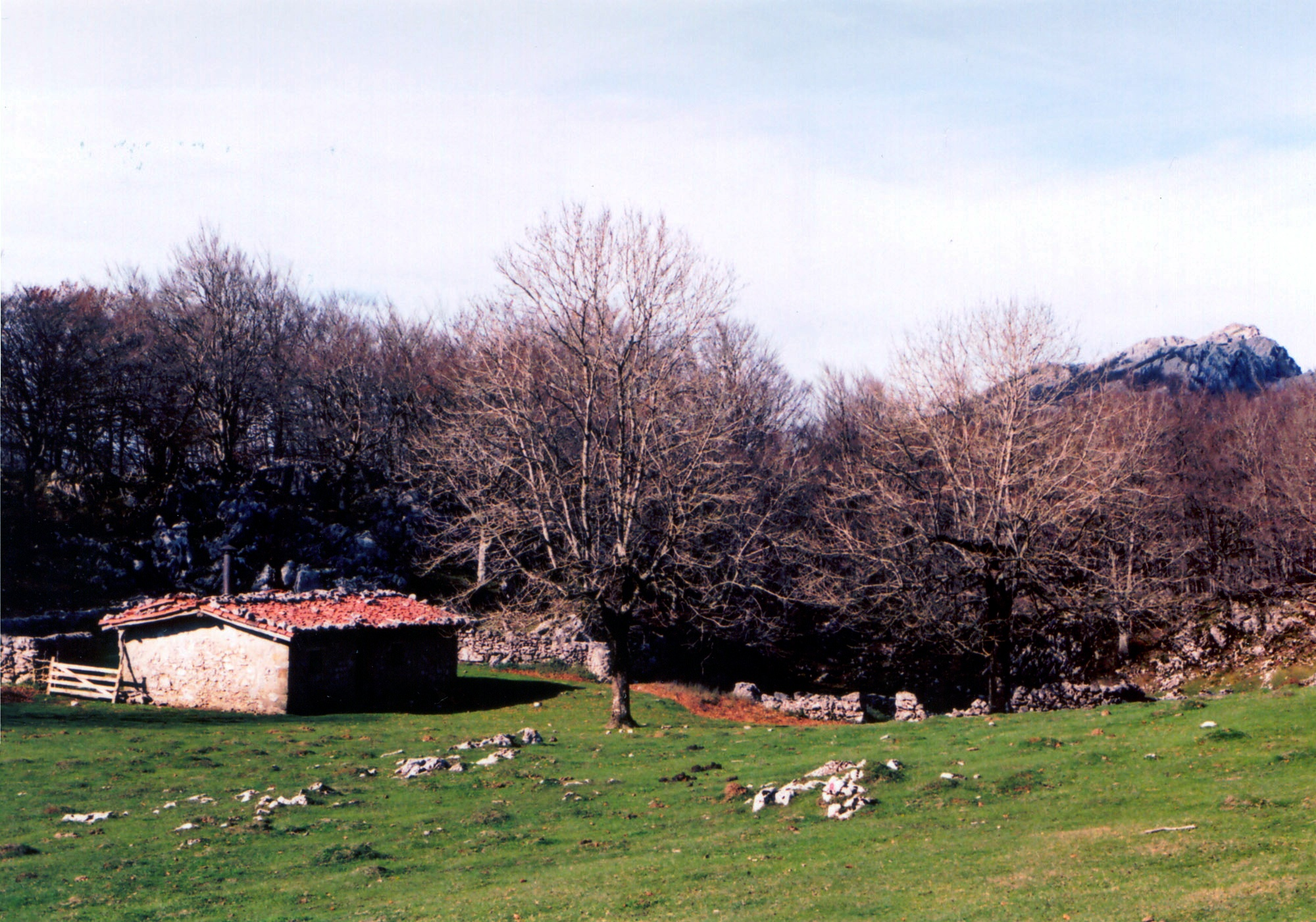 Borda Aratz con el Aitzkorri en el fondo. Borda La Chabola del Tuerto en las laderas del monte Aratz, País Vasco. En el fondo se ve la Sierra de Aitzkorri. Taken by myself. --Ardo Beltz 16:41, 13 November 2005 (UTC)